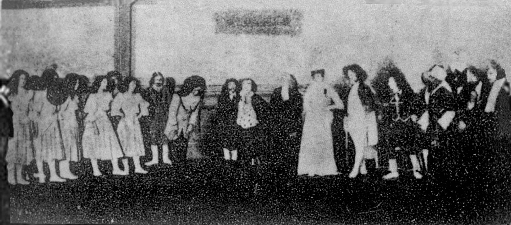 1907年6月,春柳社在日本演出《黑奴吁天录》。此为第二幕剧照。前排左起第4、5、8、9人分别是欧阳予倩饰女黑奴丑、庄云石饰哲尔治、李息霜(李叔同)饰爱米柳夫人、黄二难饰解尔培。